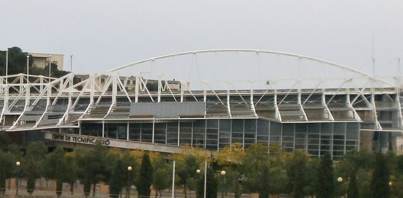 Centro de Tecnificación y Artes Gimnásticas, Alicante, España.